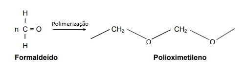 Polimerização